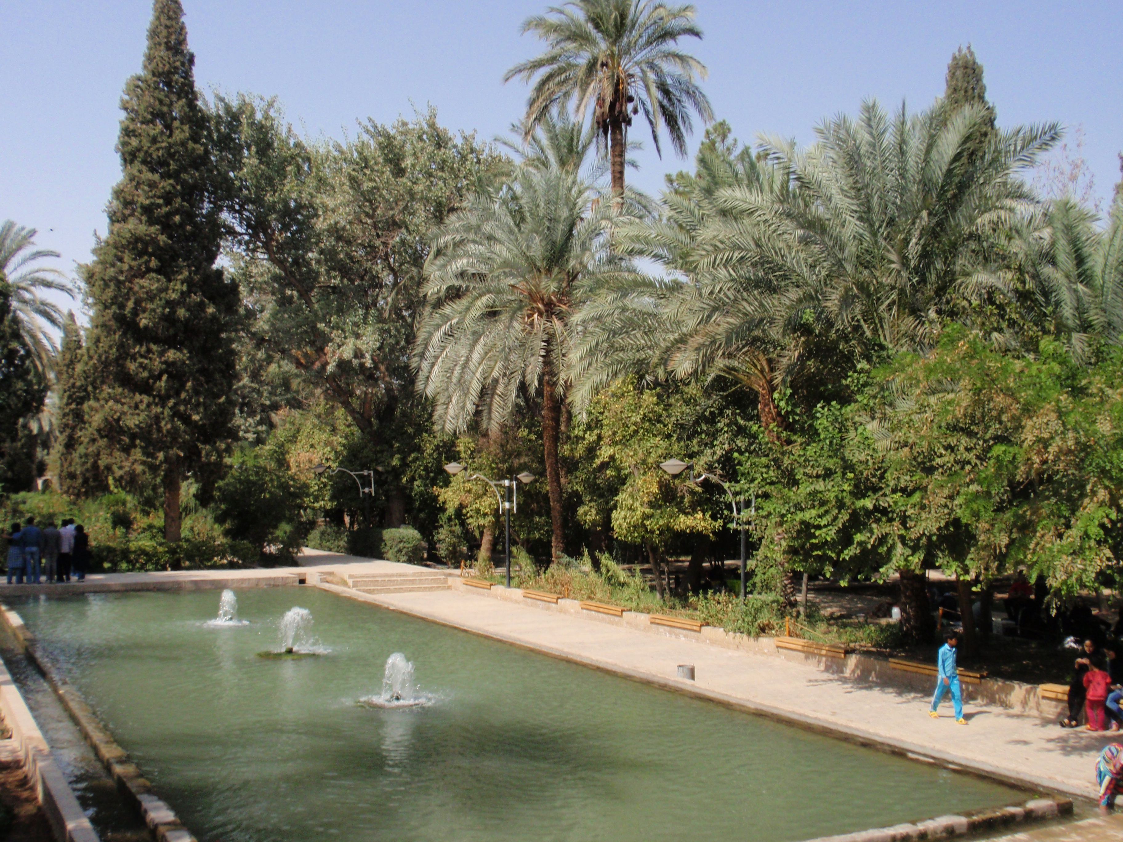 باغ گلشن